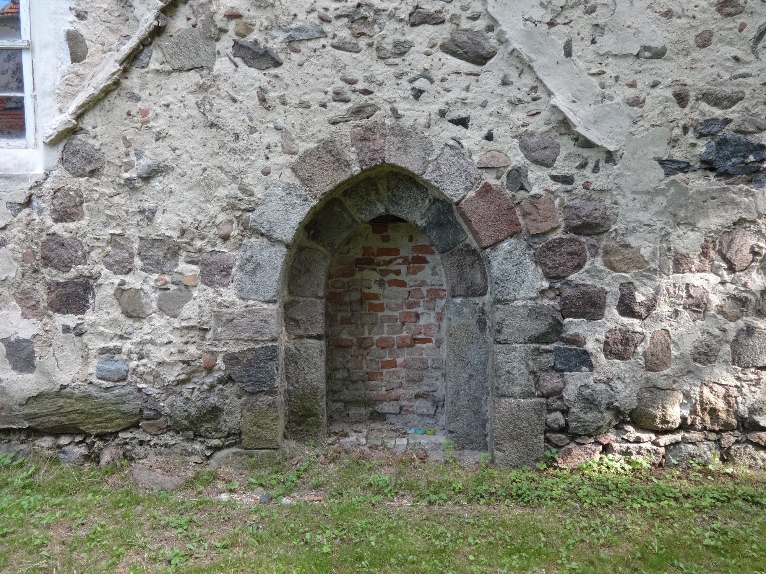 Die Dorfkirche in Klein Kienitz ist eine frühgotische Feldsteinkirche, die um 1300 entstand. 1739 erfolgte ein Umbau, bei dem unter anderem die Fenster barock vergrößert wurden. Im Innern befinden sich ein Altarretabel aus dem 17. Jahrhundert sowie zwei Epitaphe neben einem Kindergrabstein aus 1603.